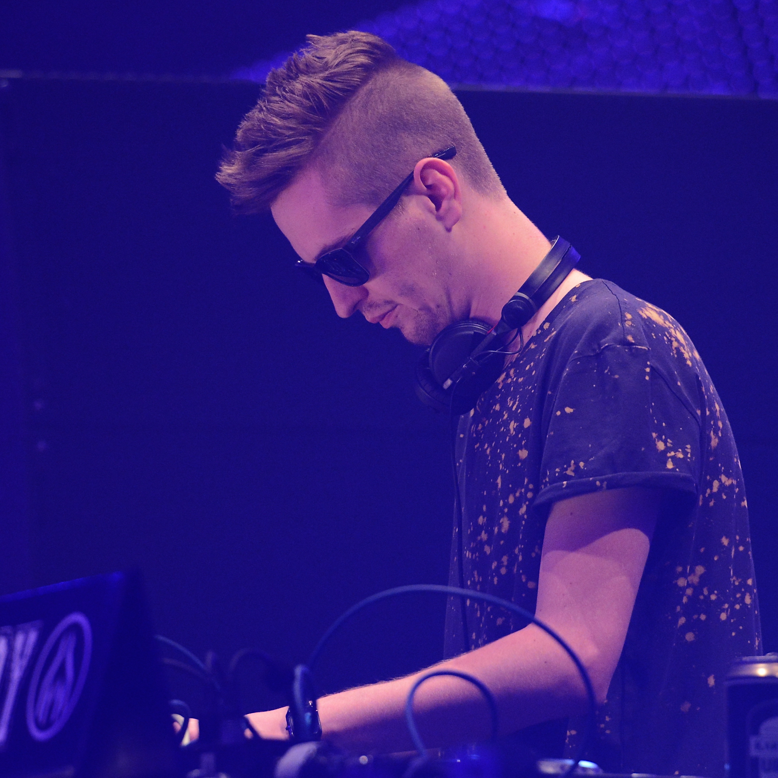 Robin Schulz bei Mayday 2014.